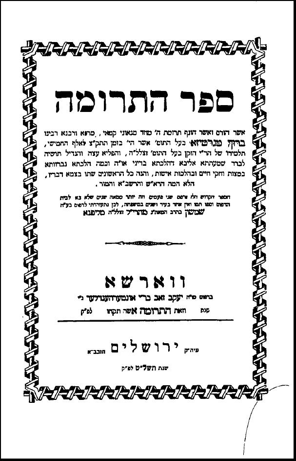 שער ספר התרומה